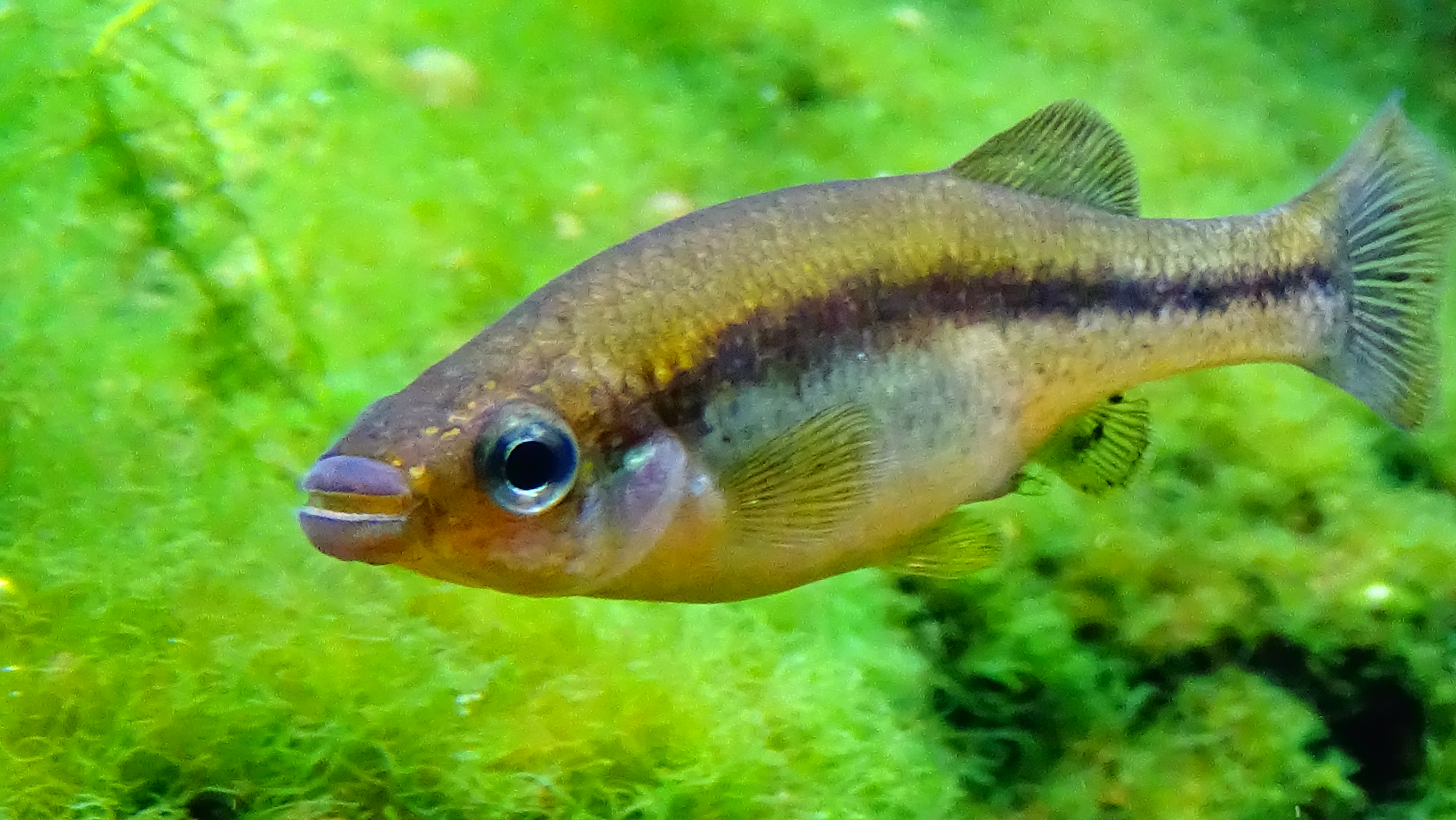 Ilyodon xantusi - Aquarium Topical du Palais de la Porte Dorée - Paris/France - 29/04/2015